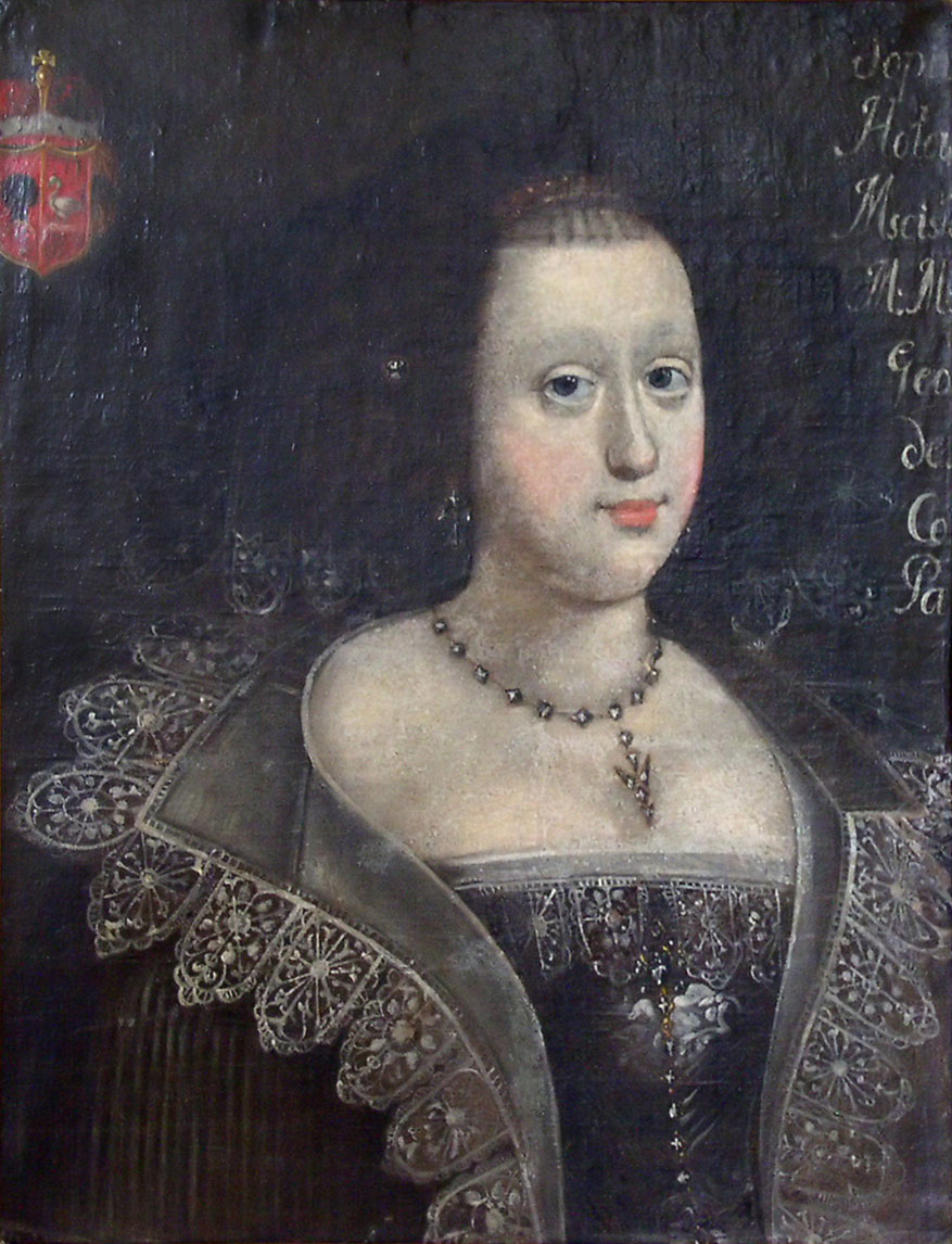 Партрэт Соф’і Галоўчынскай, жонкі Станіслава-Баніфацыя Мнішака (з 1602 года), старосты львоўскага Беларуская (тарашкевіца): Партрэт Соф’і Галоўчынскай (Sofja Hałoŭčynskaja)